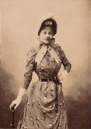 Gyp